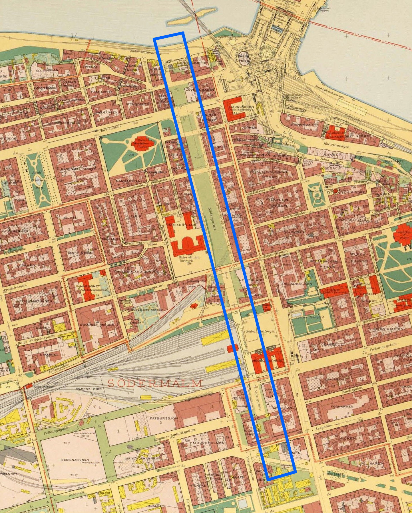 Del av 1940 års karta över Stockholm som visar området för den planerade Södergatan